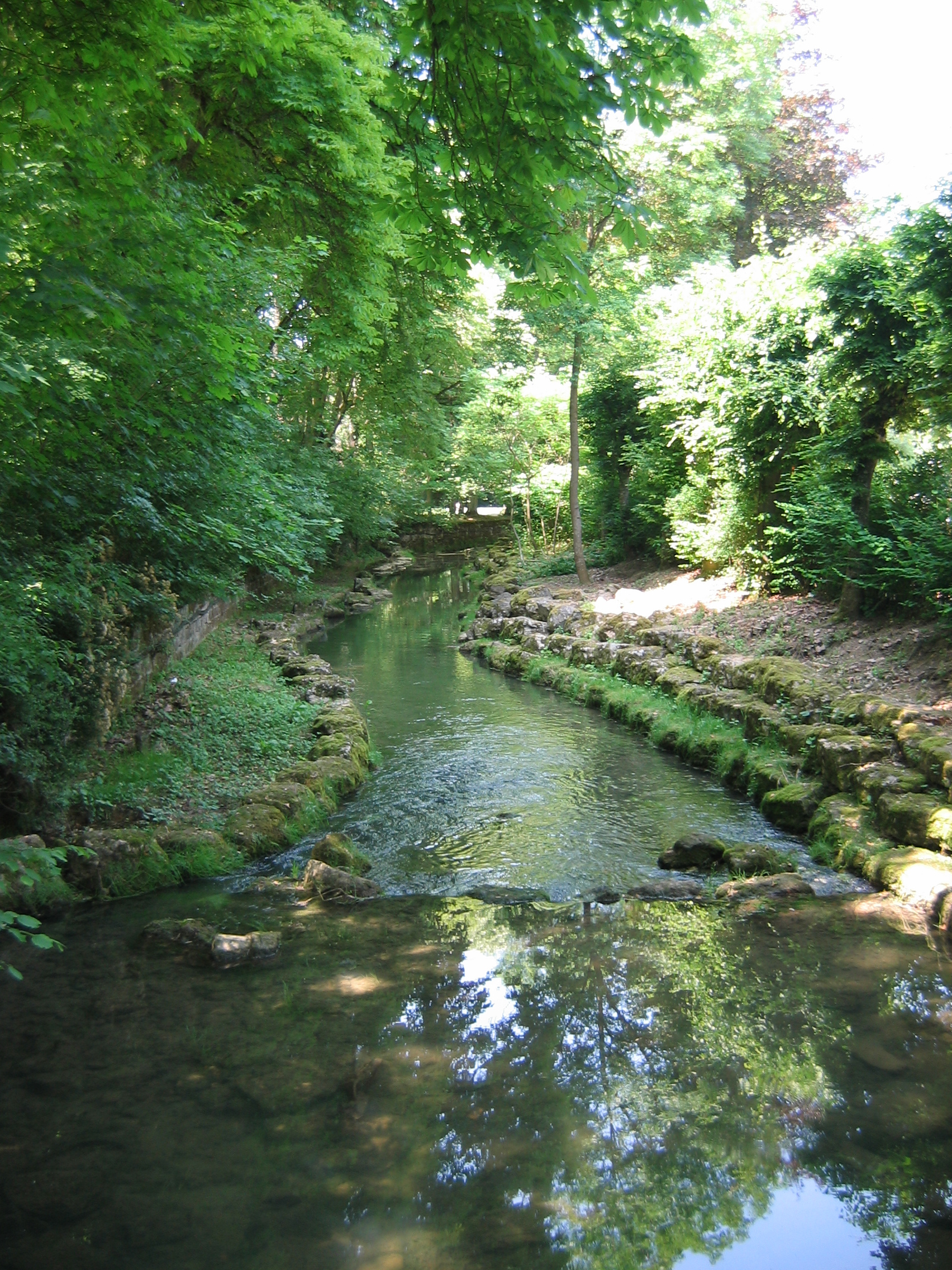 Vair, rivière traversant le parc thermal de Contrexéville, Vosges, Lorraine, France